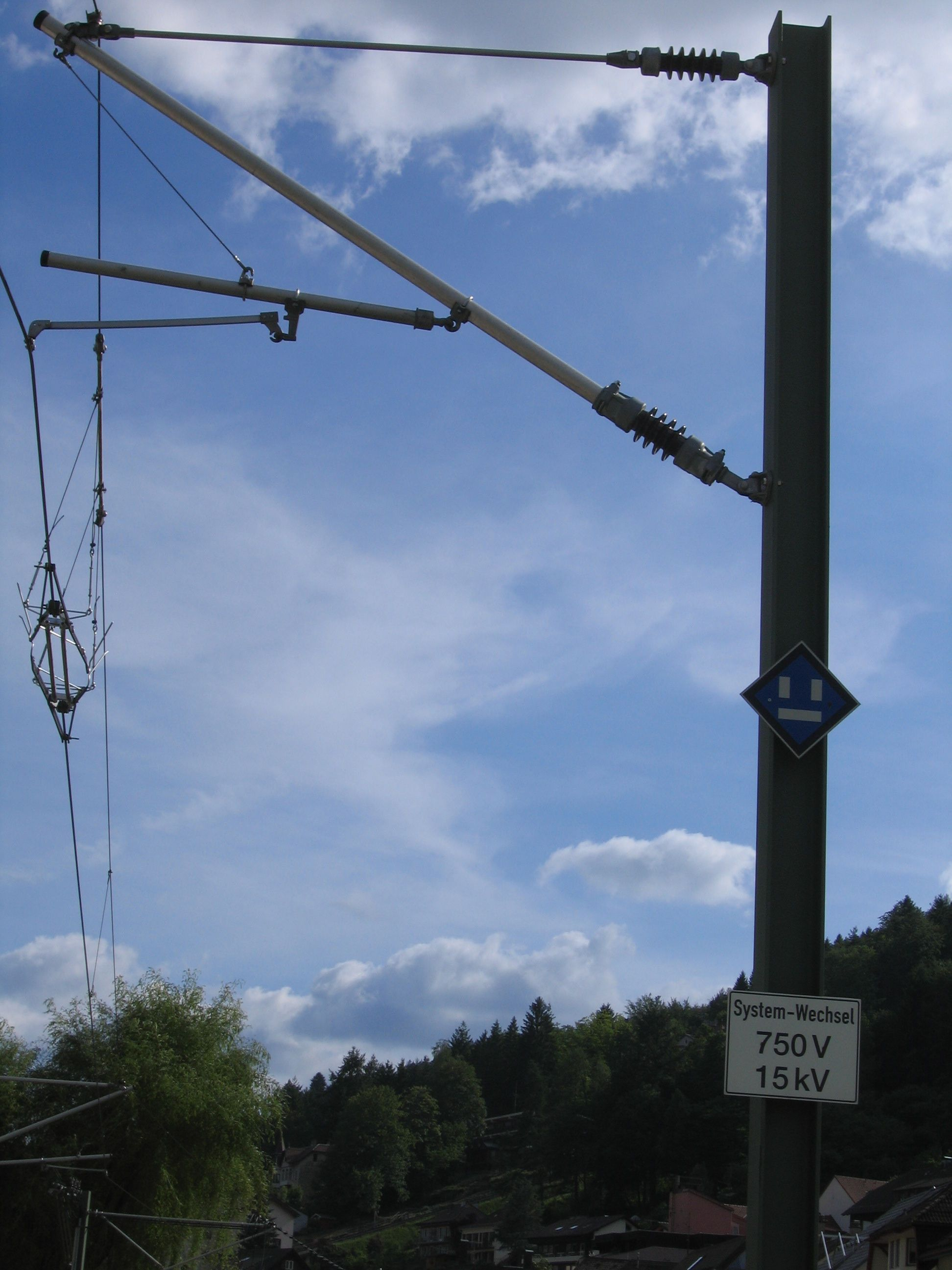 Stromsystemwechsel Stadtbahn Karlsruhe in Bad Wildbad